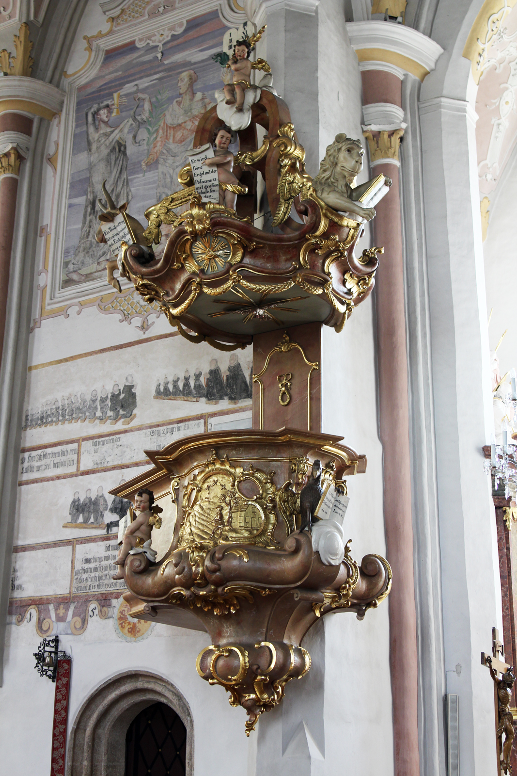 Kanzel der Pfarrkirche St. Laurentius Altheim OÖ